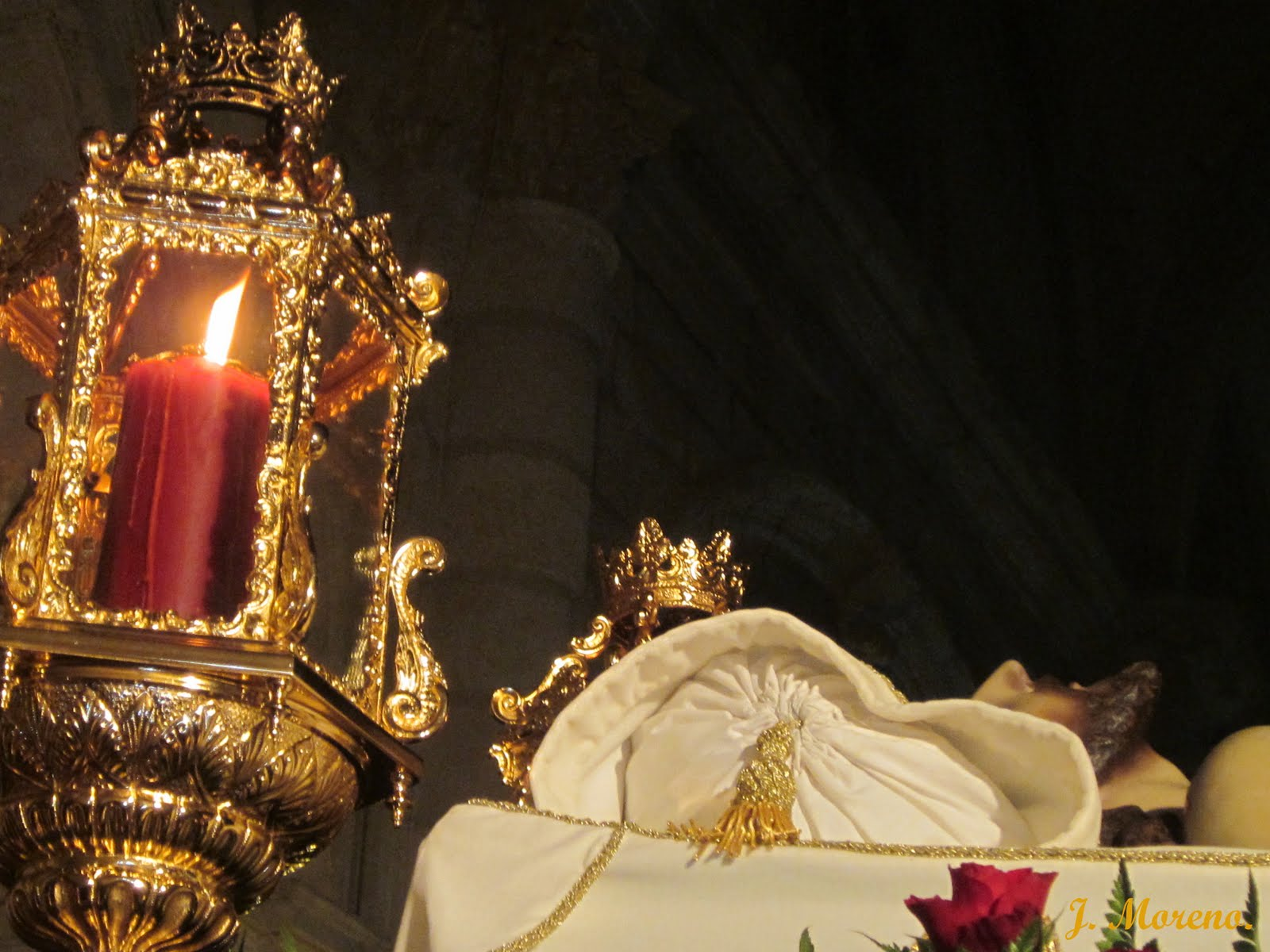 Detalle Santo Sepulcro Huelma